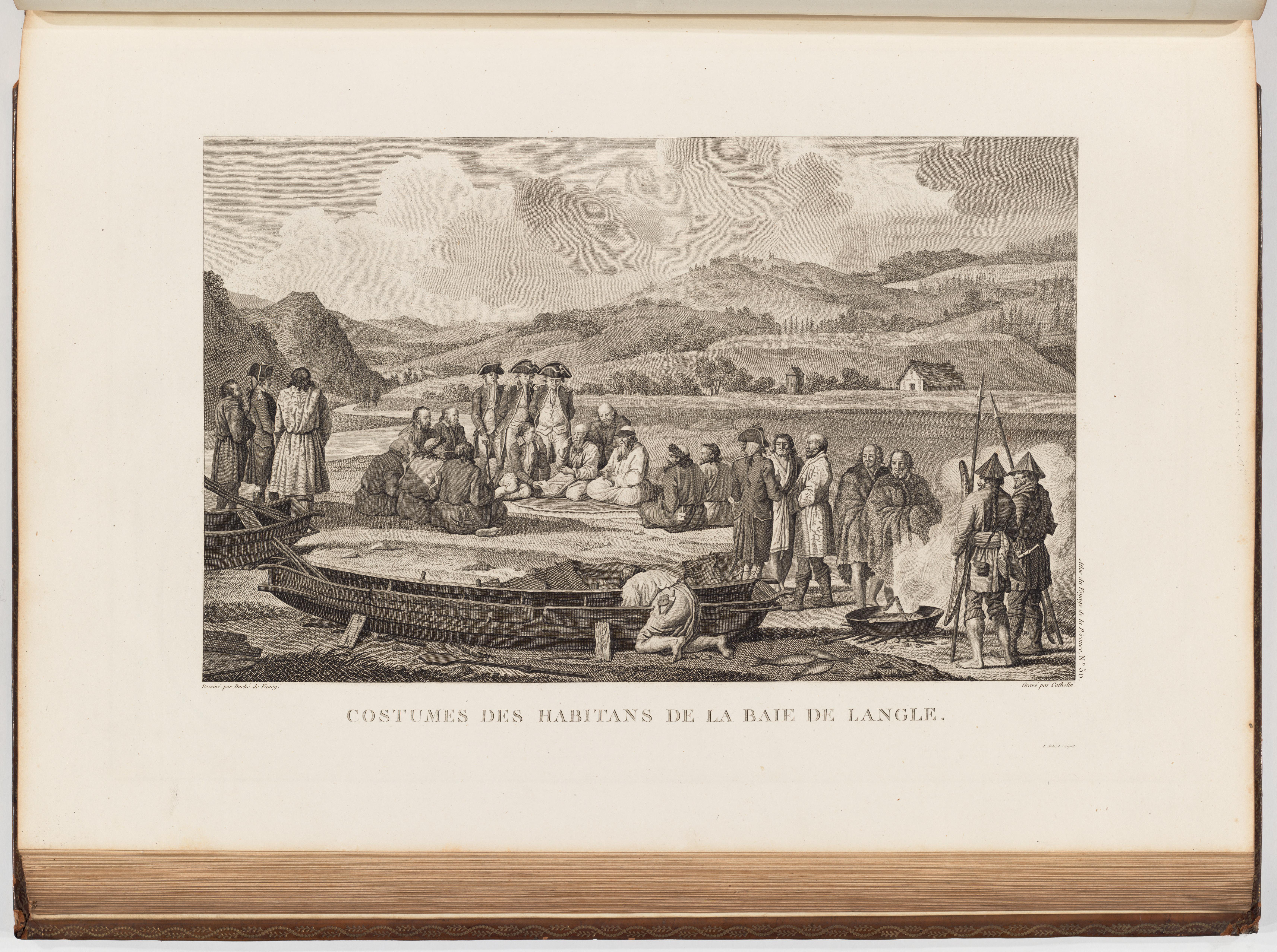 Voyage de La Pérouse autour du monde /publié conformément au décret du 22 avril 1791, et rédigé par L.A. Milet-Mureau.